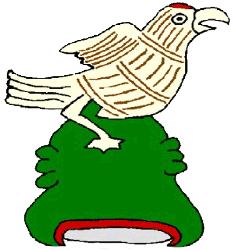 Glifo de San Bartolo Tutotepec, Hidalgo